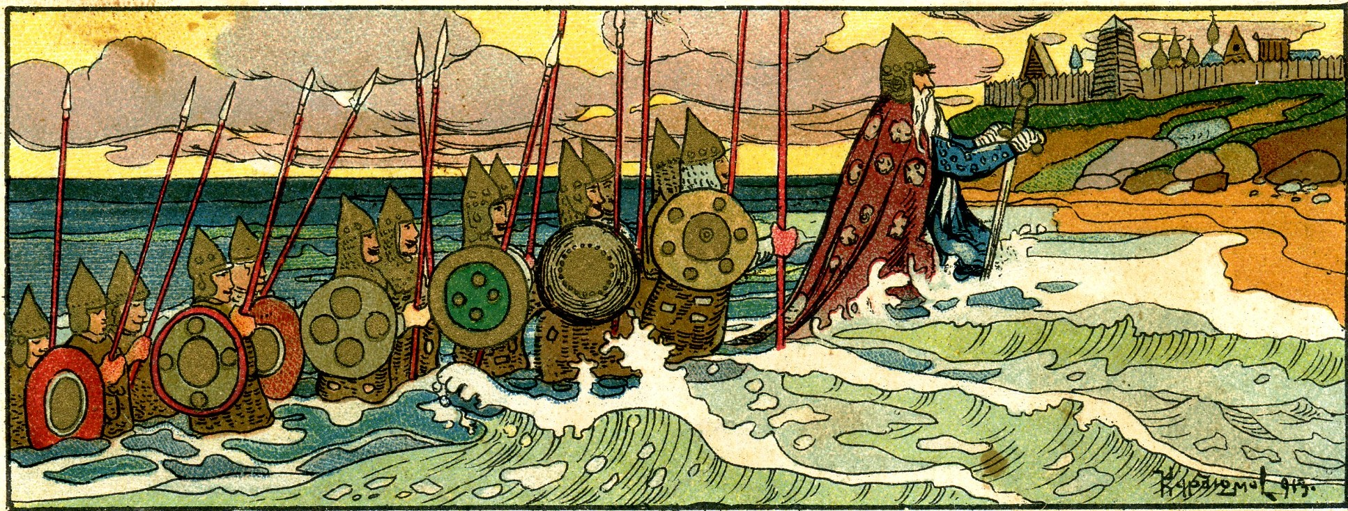 Сказка о царе Салтане. 1913. Рисунки В.Н. Курдюмова. Издание И.Д. Сытина